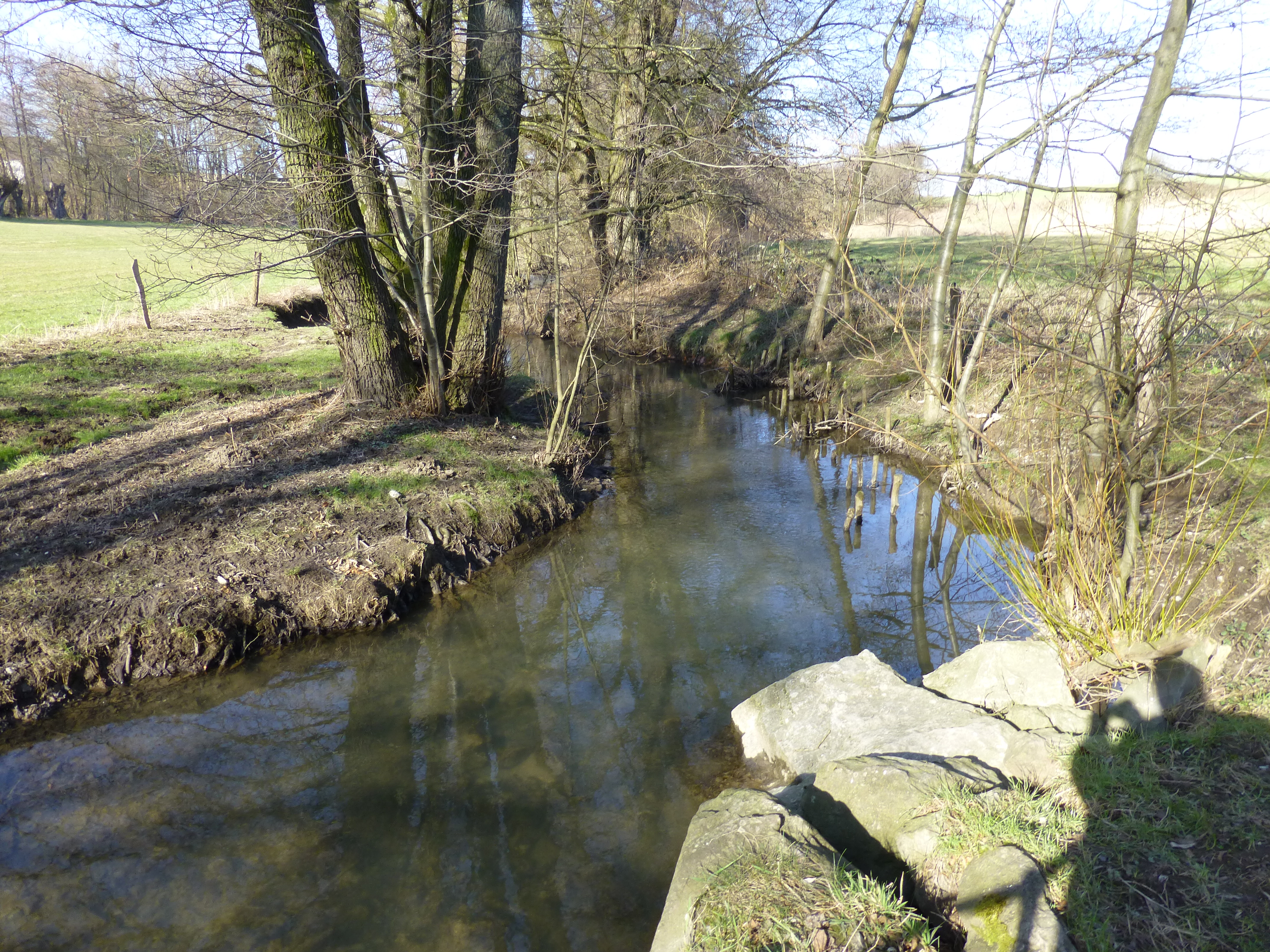 Voisberger Weg, Wülfrath